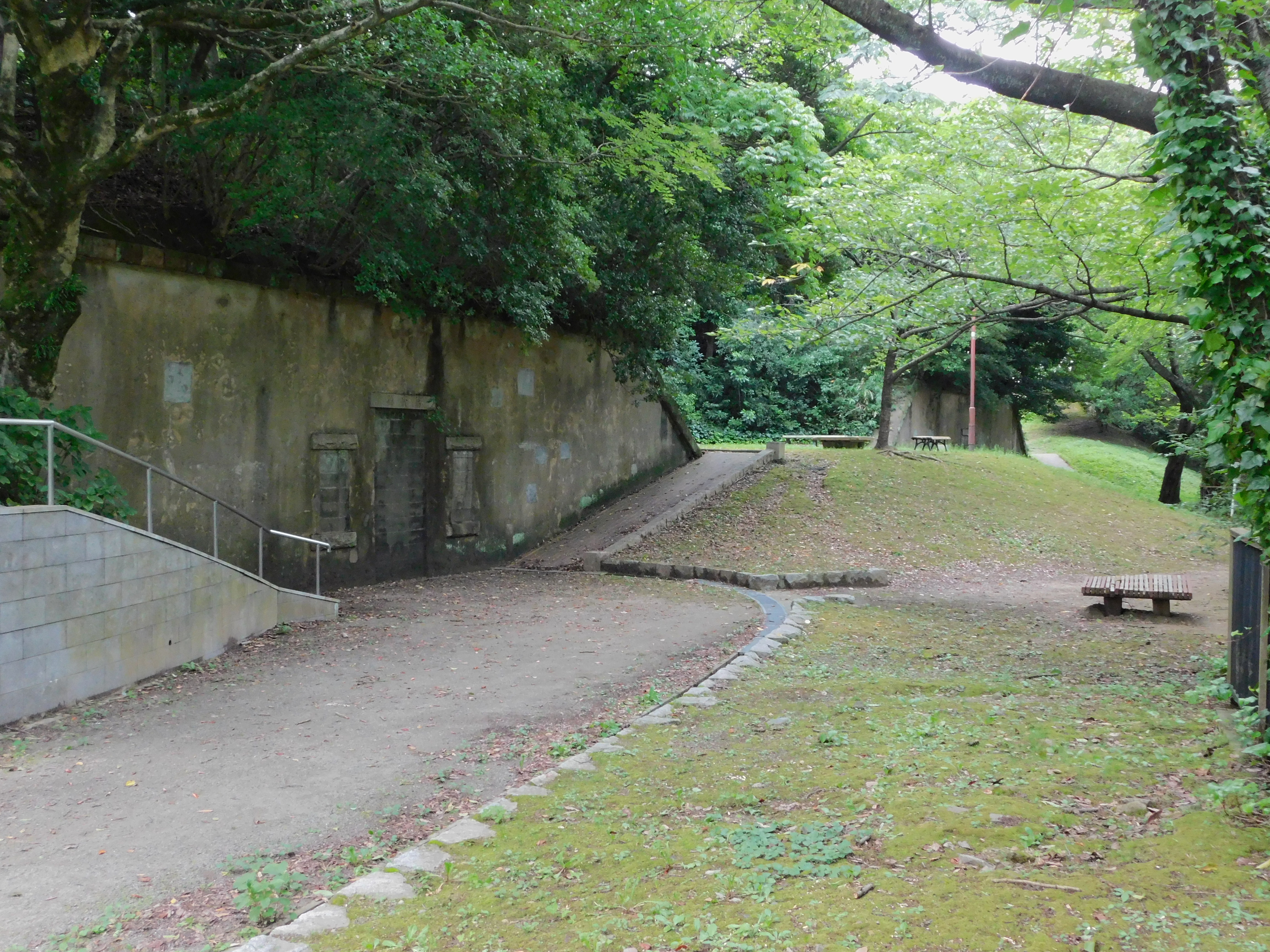 2019年7月24日